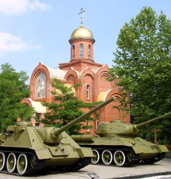 Георгиевский храм в Одессе. Храм Cвятого Великомученика и Победоносца Георгия на месте нахождения 411-й береговой батареи.